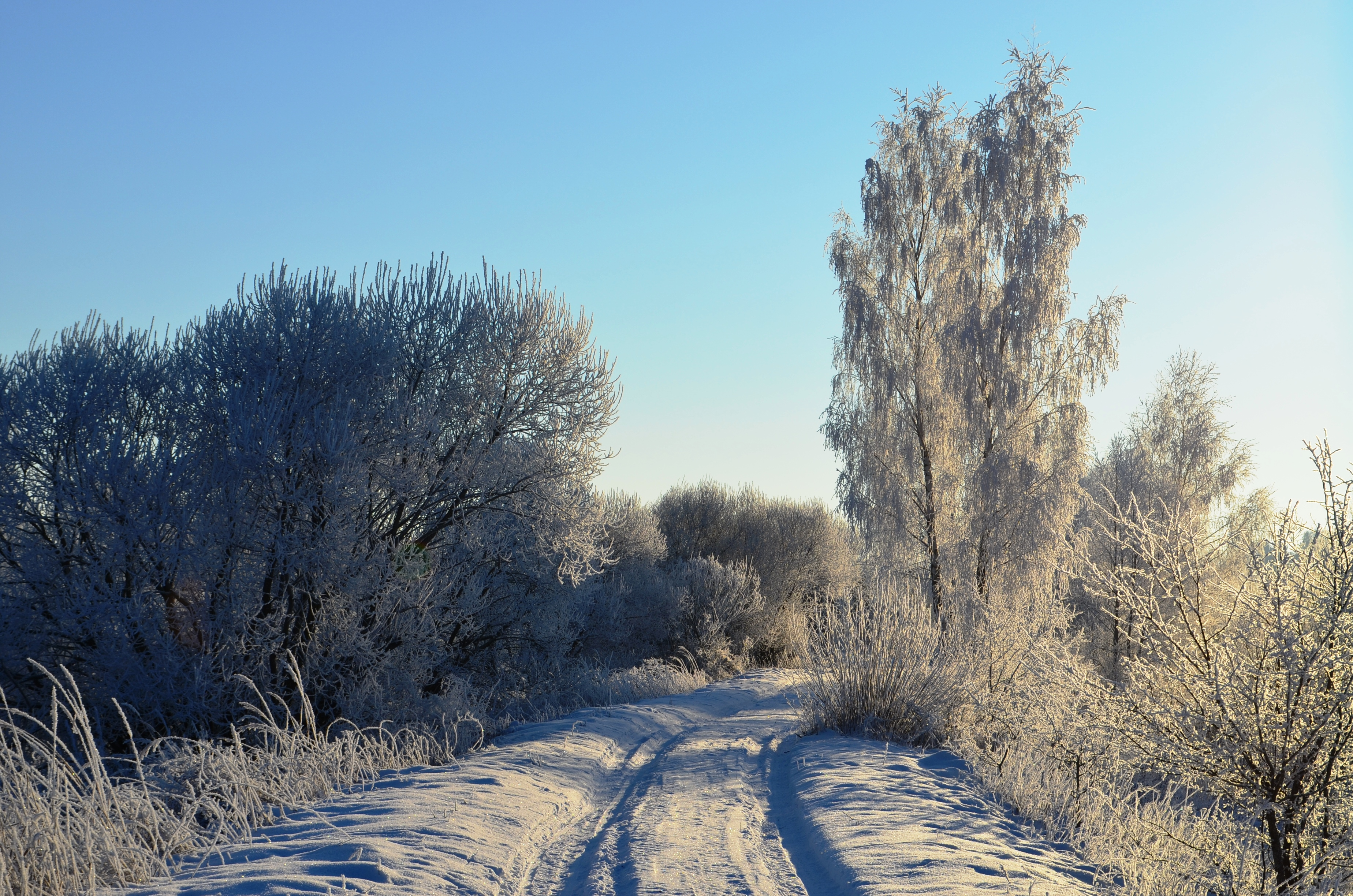 Žiema, Justinavos apylinkės, Kėdainių raj.